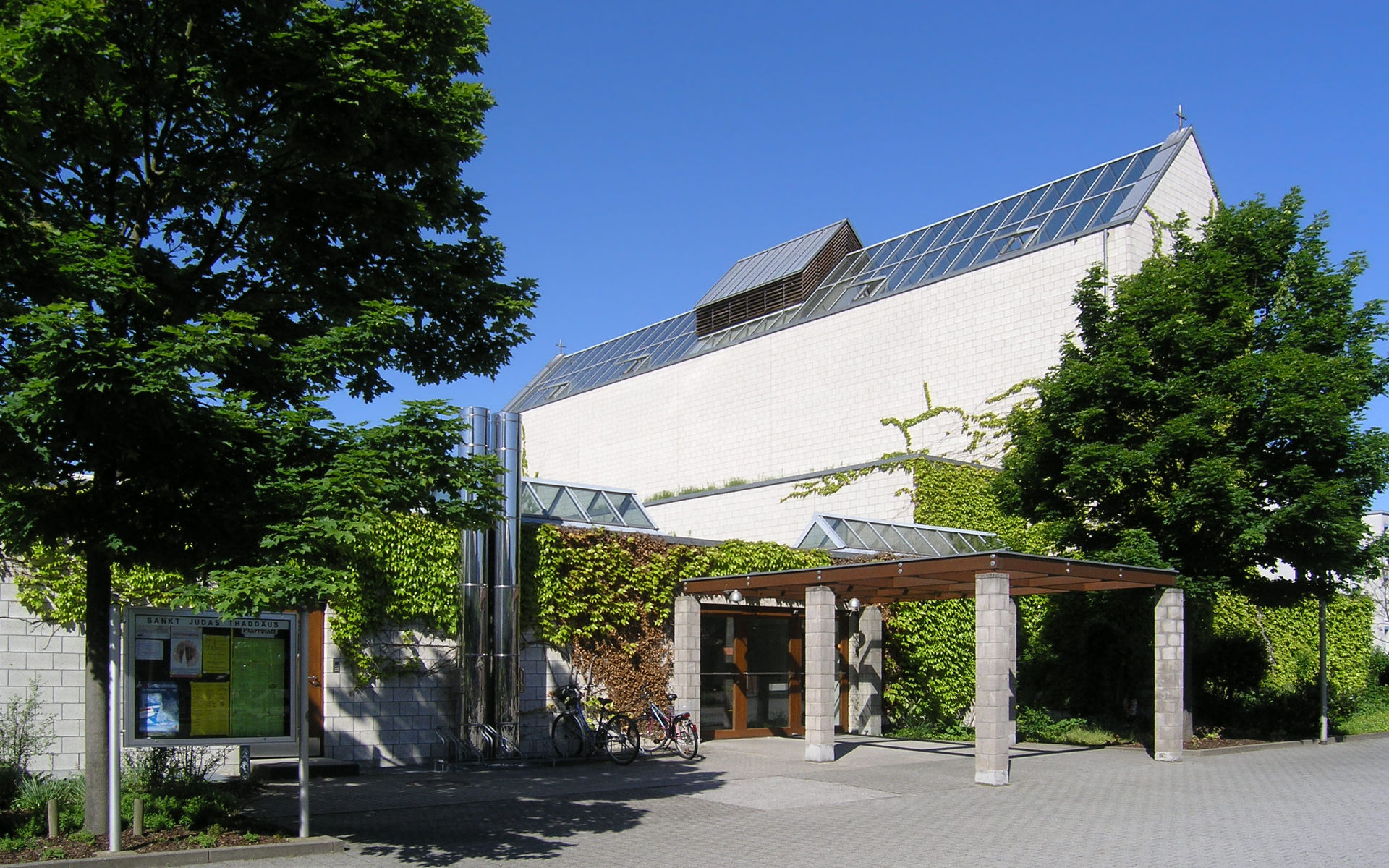 Katholische Kirche St. Judas Thaddäus in Karlsruhe-Neureut, 1980–89 von Ottokar Uhl